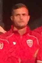 Mattia Finotto durante la presentazione della squadra dell'A.C. Monza nel 2019.